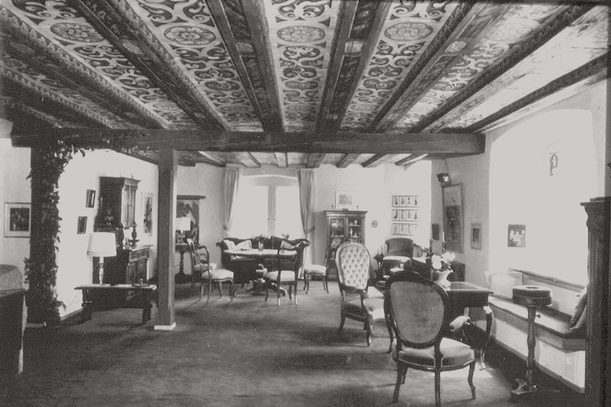 Traubenberg (Zollikon), grosser Salon um 1920